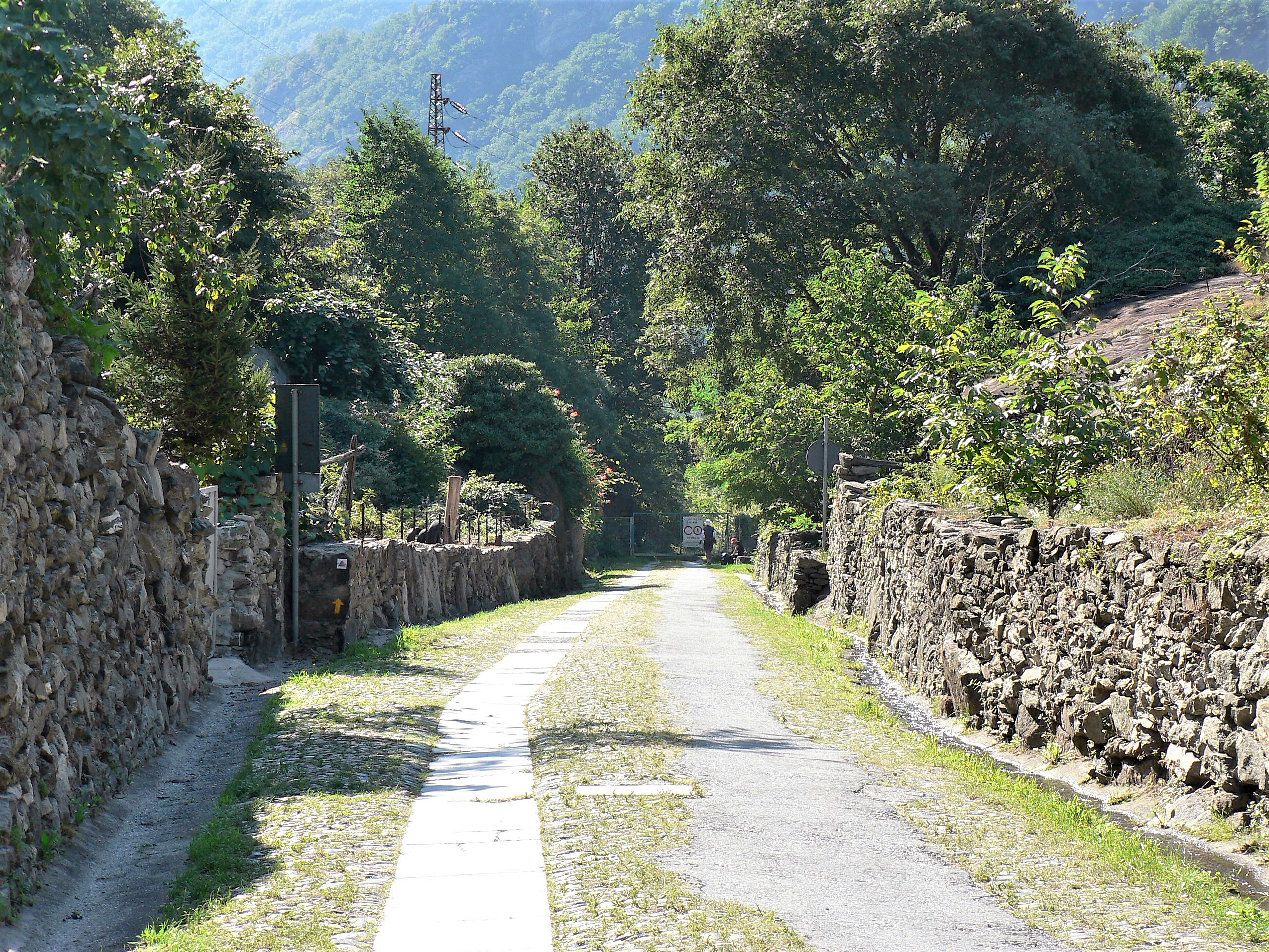 La via Francigena a Bard, tra i vigneti, nei pressi del cimitero e del parco archeologico. Bard, Valle d'Aosta, Italia. Coincide con il percorso della via delle Gallie, ed è sul tracciato del trail Tor des Géants.